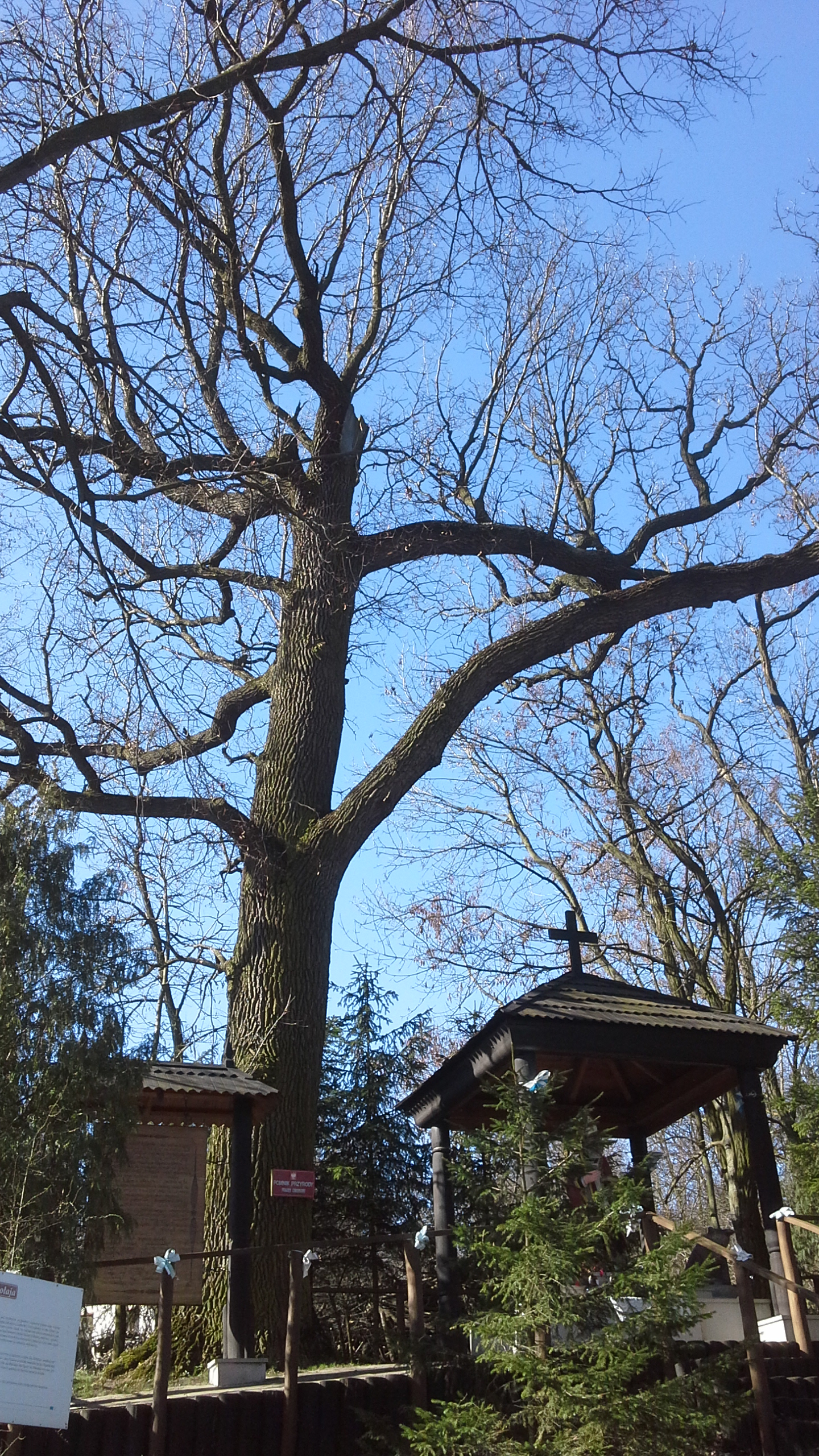 Kaplica św. Mikołaja z wilkiem w Kryłowie. Pomnikowa topola